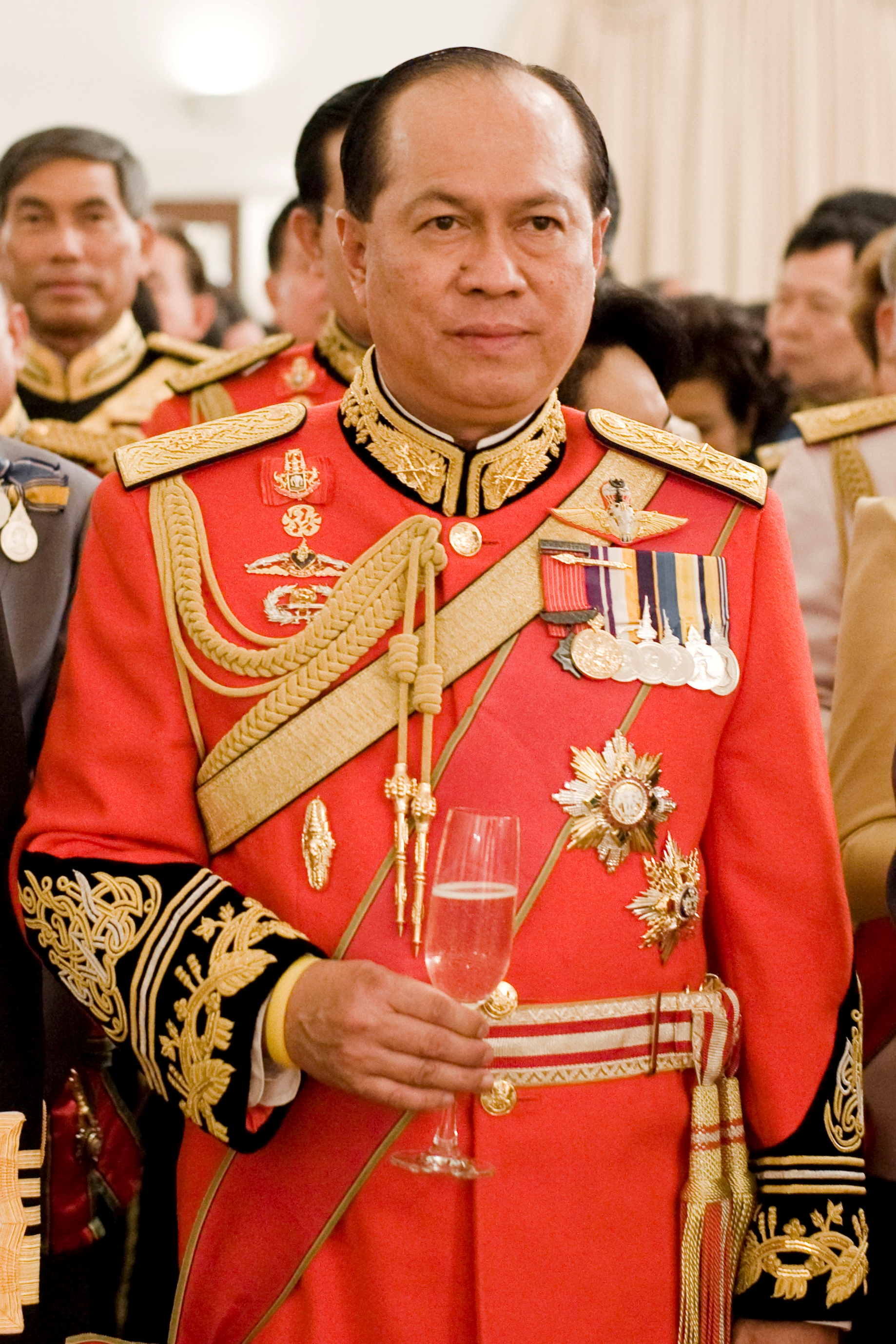 Royal Thai Navy Chief Admiral Kamthorn Phumhiran, Royal Thai Army Chief General Anupong Paojinda and Royal Thai Armed Forces Supreme Commander General Songkitti Chakkrabat พลเรือเอกกำธร พุ่มหิรัญ / พลเอกอนุพงษ์ เผ่าจินดา / พลเอกทรงกิตติ จักกาบาตร์ นายกรัฐมนตรีเป็นเจ้าภาพจัดงานสโมสรสันนิบาตเฉลิมพระเกียรติพระบาทสมเด็จพระ เจ้าอยู่หัวเนื่องวันฉัตรมงคล วันที่ 5 พฤษภาคม 2553 ในนามรัฐบาล ณ ตึกสันติไมตรี ทำเนียบรัฐบาล (The Official Site of The Prime Minister of Thailand Photo by พีรพัฒน์ วิมลรังครัตน์)